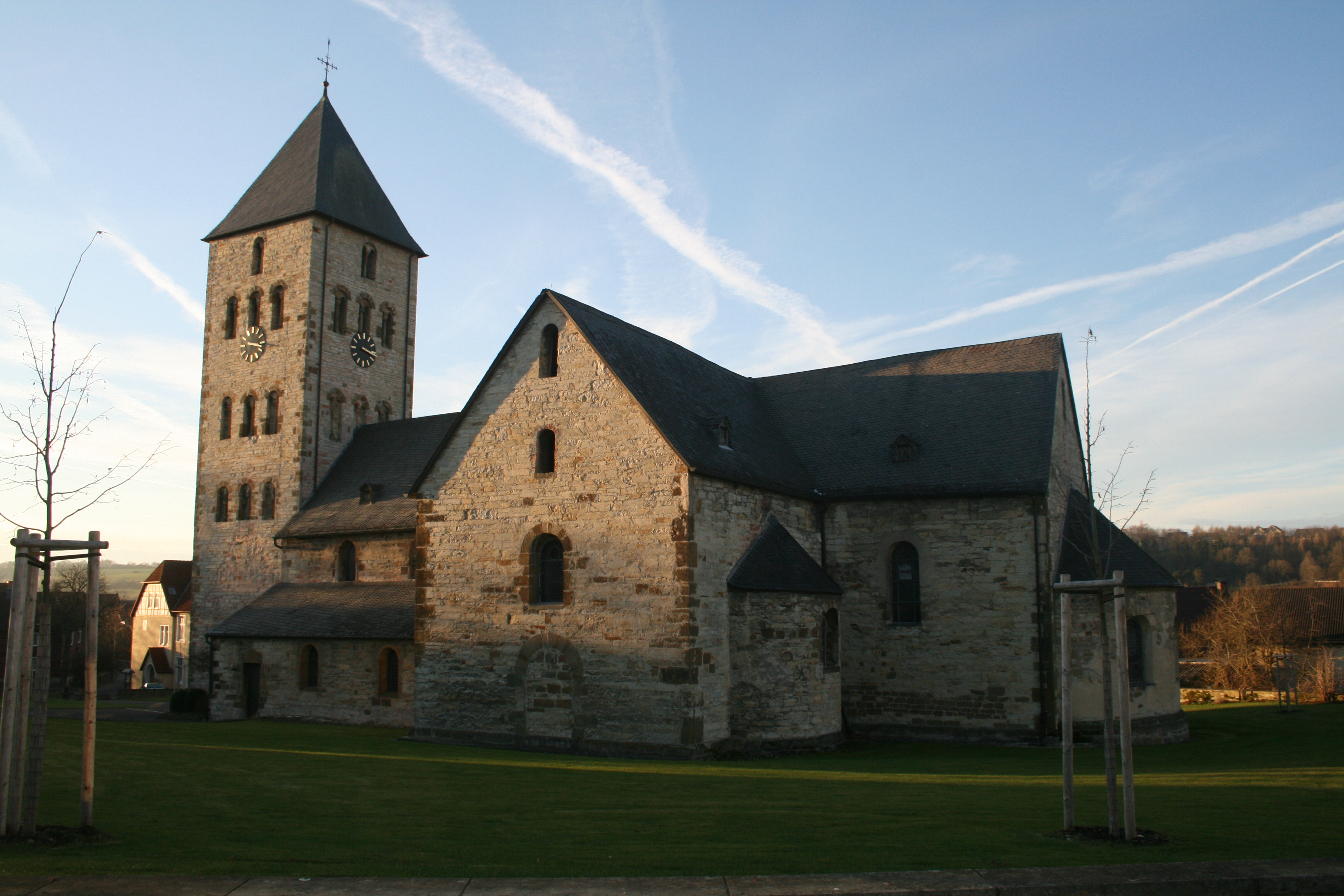 Bild der Brenkener Kirche